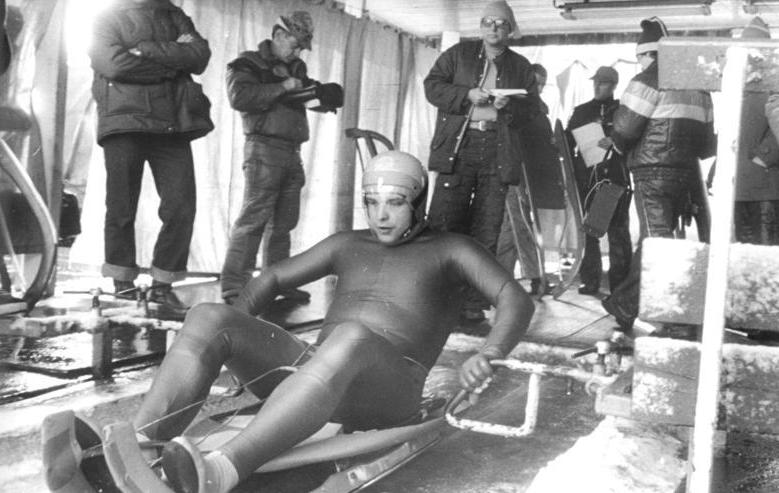 Bernhard Glass ADN-ZB Schaar zi-16.10.1981-Oberhof: Start in die neue Saison-Olympiasieger Bernhard Glass (ASK Oberhof) startet neben der gesamten DDR-Spitzenklasse zu den Handicap-Rennen, die die neue Rennschlittensaison eröffnen.